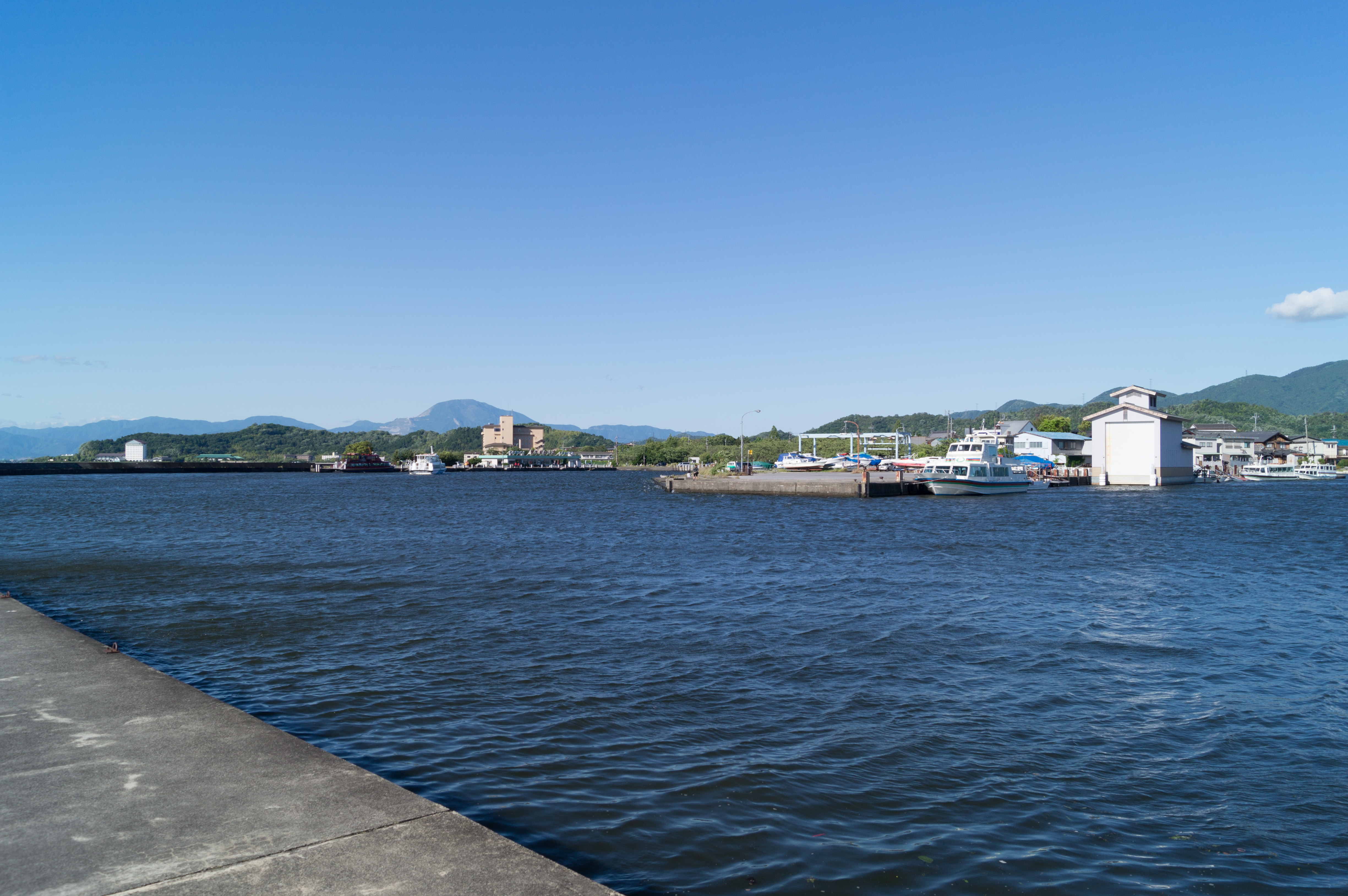 彦根港全景。